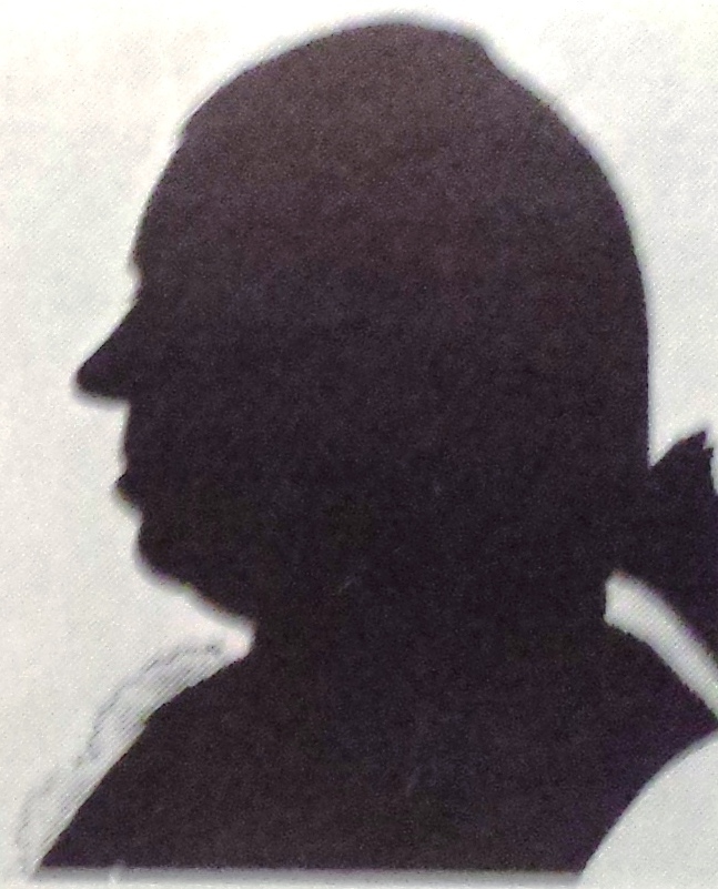 Berndt Fredrik Johan Stackelberg, 1733-1801, Major General, Royal Swedish Army.